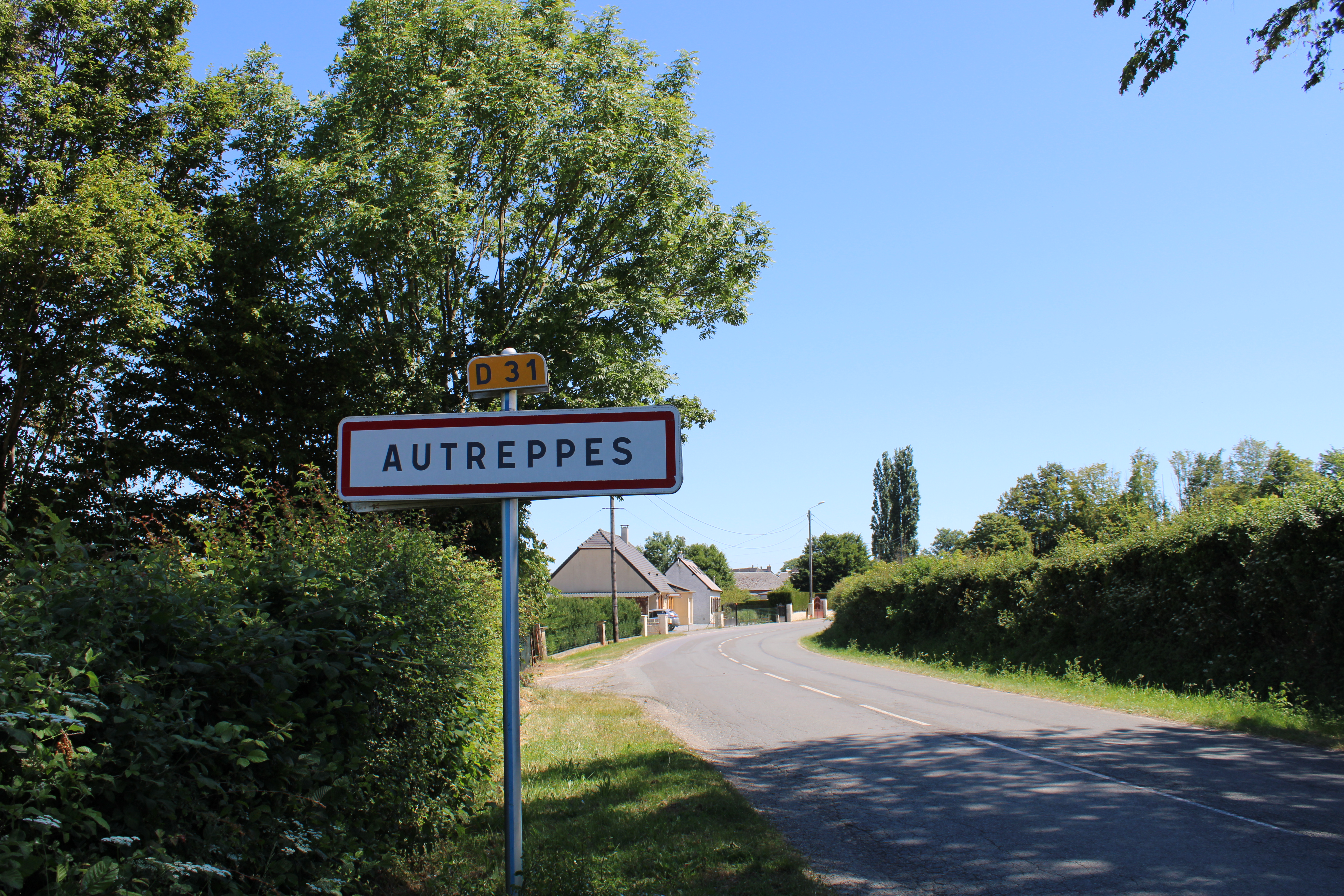 Entrée du village